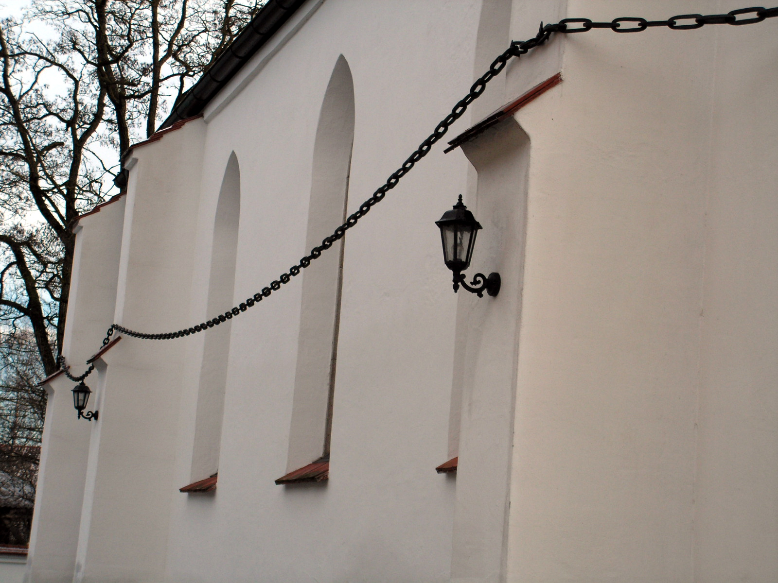 Kettenkriche Ganacker